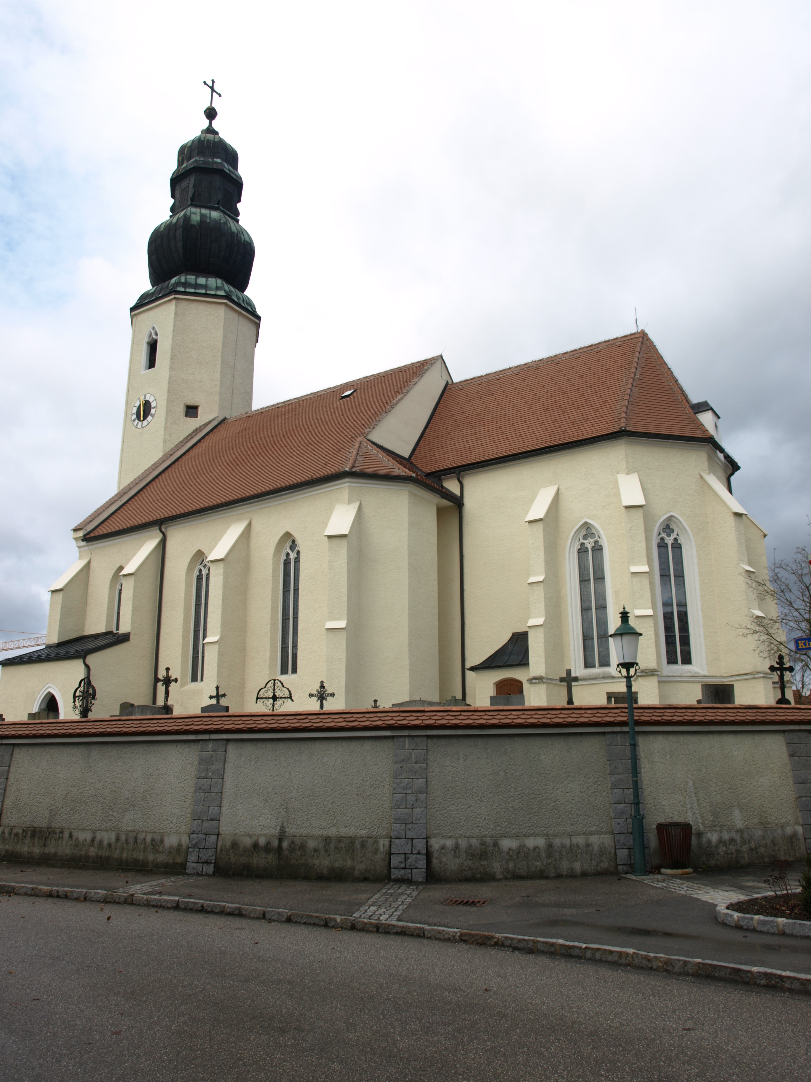 Kath. Pfarrkirche hl. Veit und Friedhof